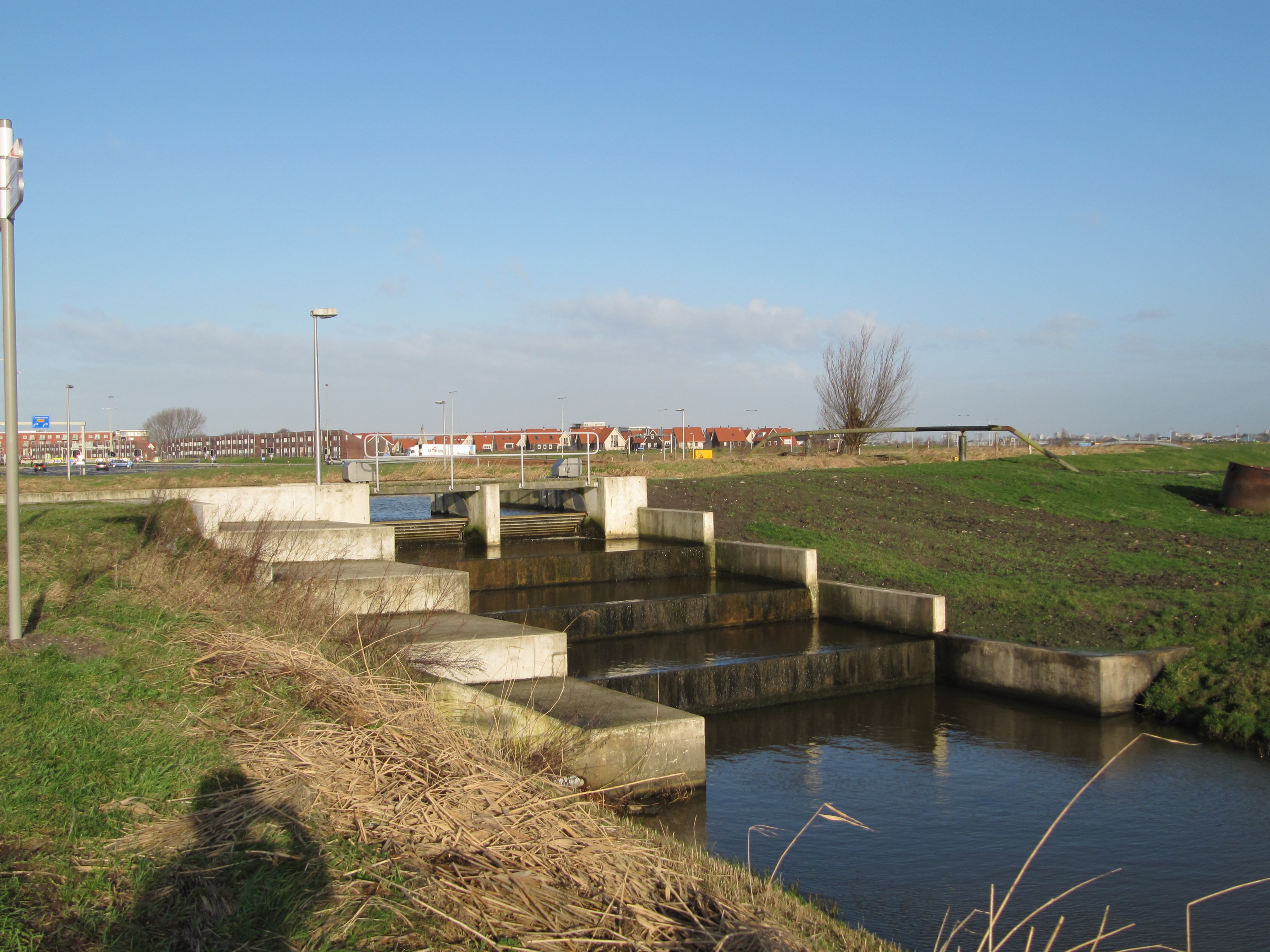 Berkel en Rodenrijs - Polder van Pijnacker / Oostmeerpolder waterinlaat polder Berkel naar gemaal Meerpolder